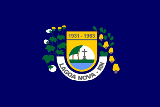 Bandeira de Lagoa Nova, Rio Grande do Norte, Brasil.